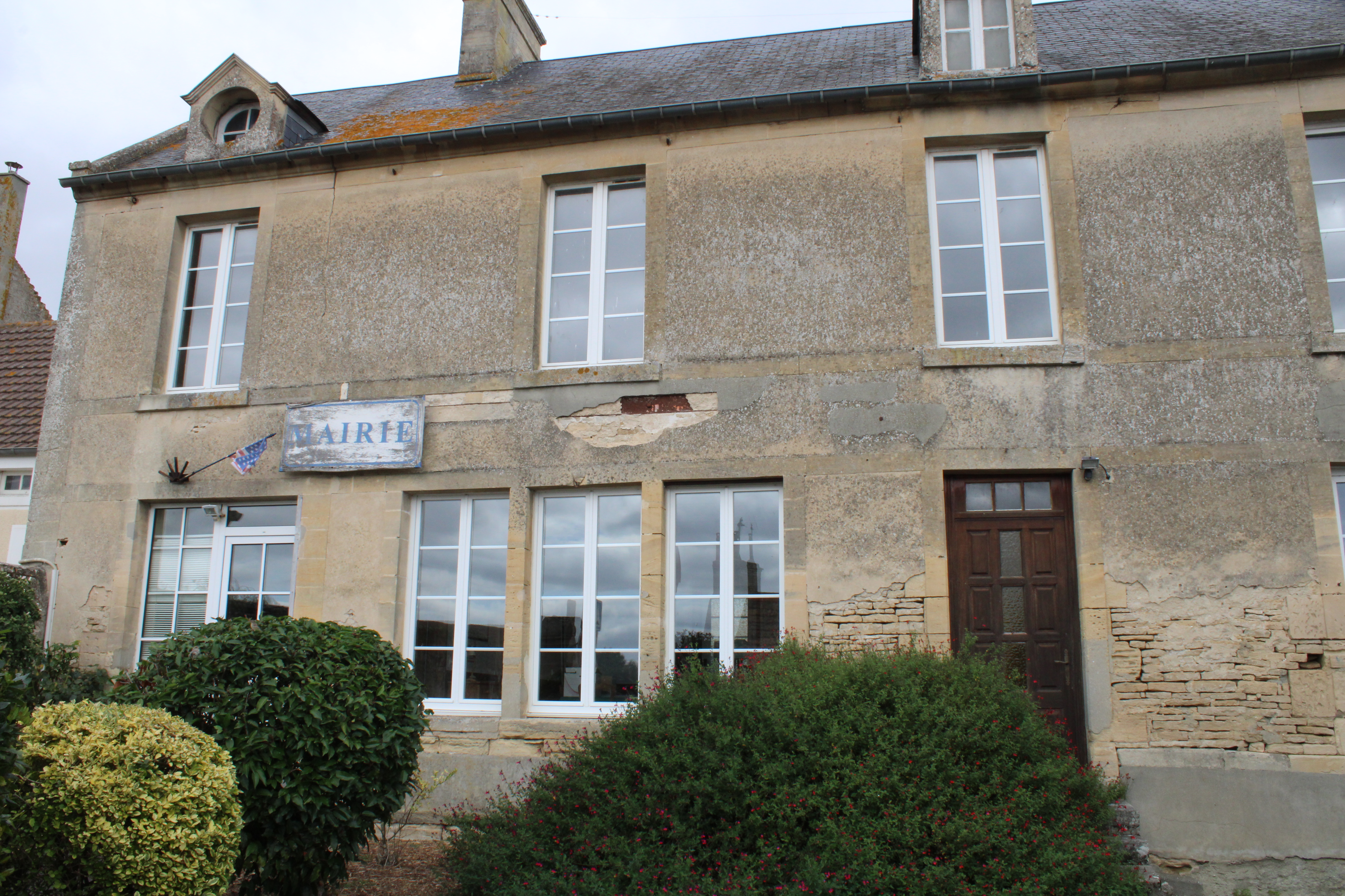 La mairie de Ponts sur Seulles